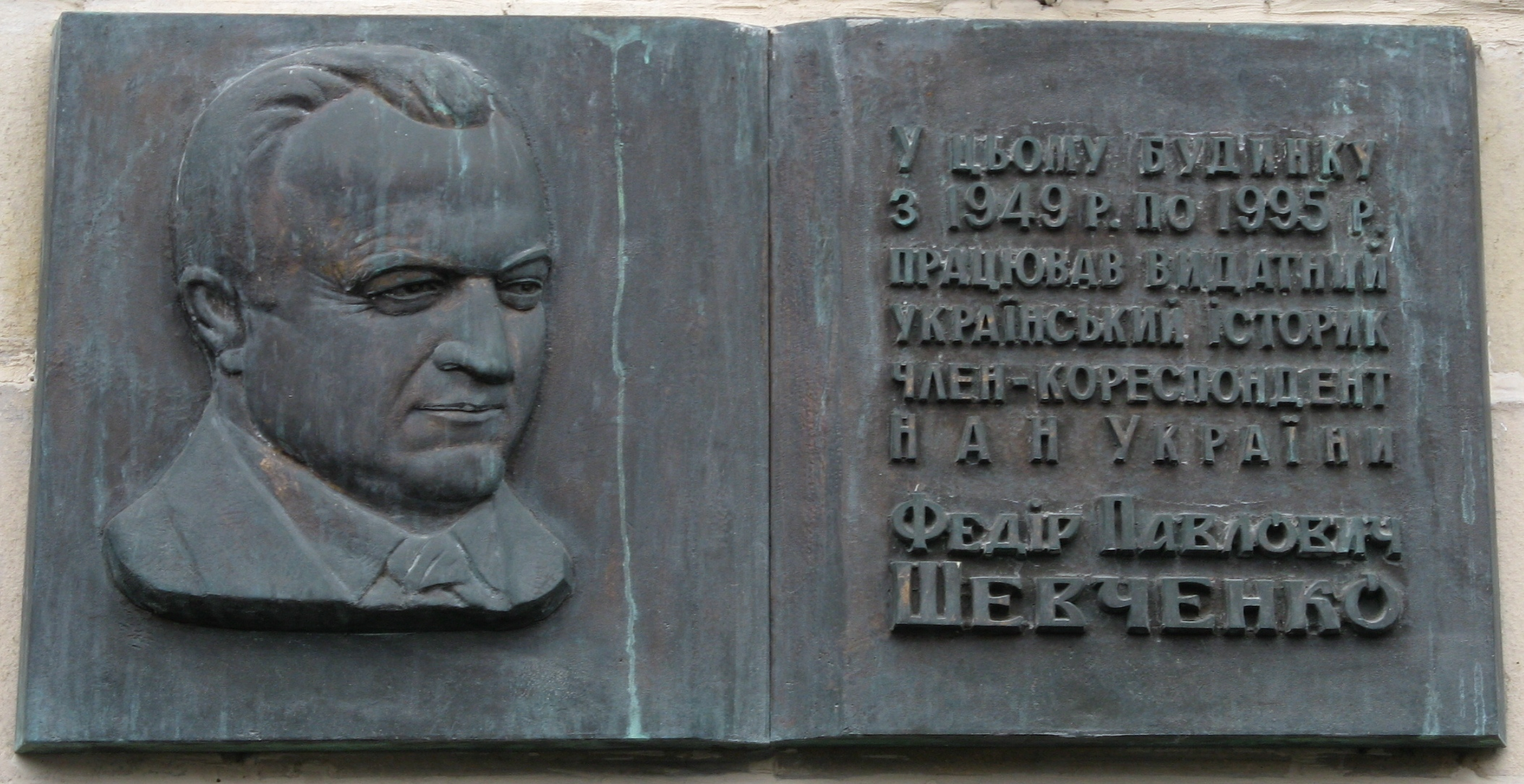 Памятная доска установлена в Киеве, на здании на ул. Грушевского, 4. Шевченко, Фёдор Павлович, украинский советский историк, доктор исторических наук , профессор, член-корреспондент АН УССР.